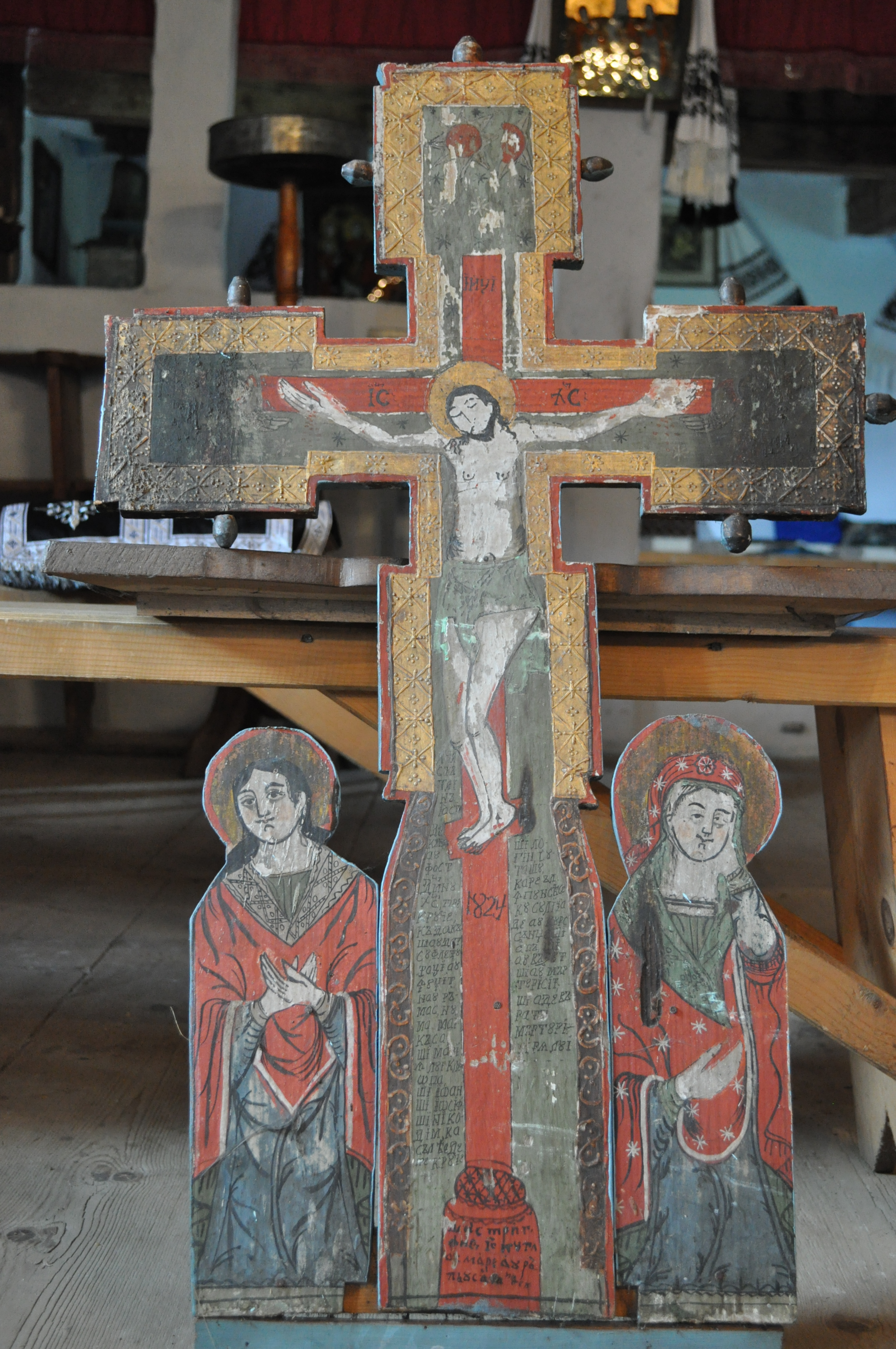 Biserica de lemn „Sfinții Arhangheli” din Surduc, județul Cluj